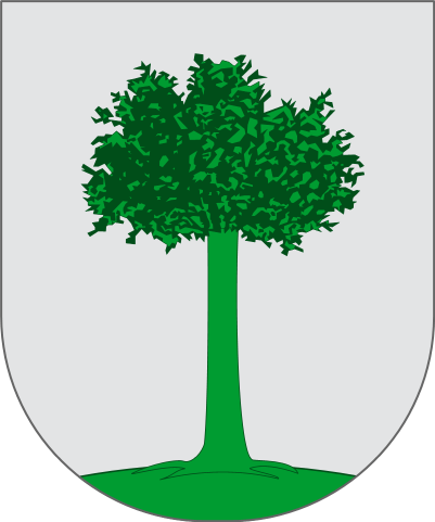 Itsasondo herriko armarria